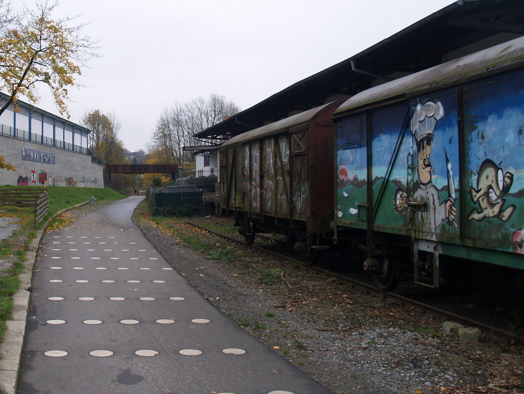 Der Radweg "Trasse des Werkzeugs" in Remscheid. Ortsteil Vieringhausen, Blickrichtung RS-Hbf.